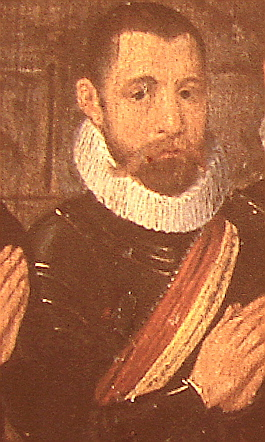 Axel Ottesen Brahe (1550-1616), lensherre og rigsråd, afbildet på familieepitafium i Kågerød Kirke, Skåne, Sverige